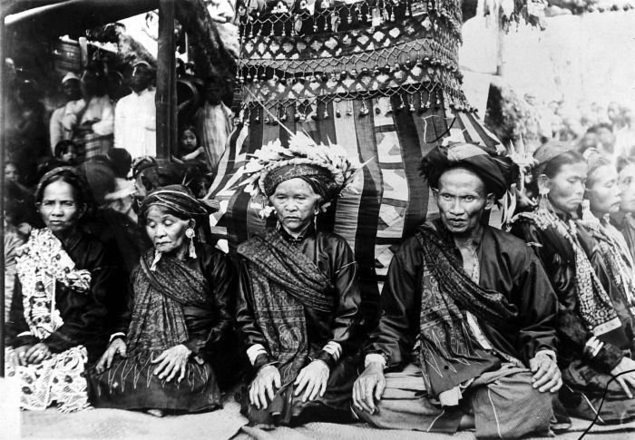 Repronegatief. Kerintji was een geïsoleerd gebied, goed verscholen achter bergruggen. Net als in de Bataklanden drong het koloniale bestuur er pas laat (na 1900) door. Het is een gebied met een lange bewoningsgeschiedenis, getuige bijvoorbeeld megalithische sculpturen. Er werd ook al lang natte rijst verbouwd en handel gedreven met de buitenwereld. Het was ook een gebied met een geheimzinnige reputatie en tot in Maleisië, waar hajis uit Kerentji handel kwamen drijven, geloofde men dat de mensen uit dat gebied zich 's nachts in tijgers konden veranderen. Bij het jaarlijkse oogstfeest (kenduri seko) werden vaak trancedansen opgevoerd. (P. Boomgaard, 2001). Een aantal religieuze specialisten zitten rondom een met textiel bekleed bouwwerk tijdens een oogstfeest te Kumun, Sumatra